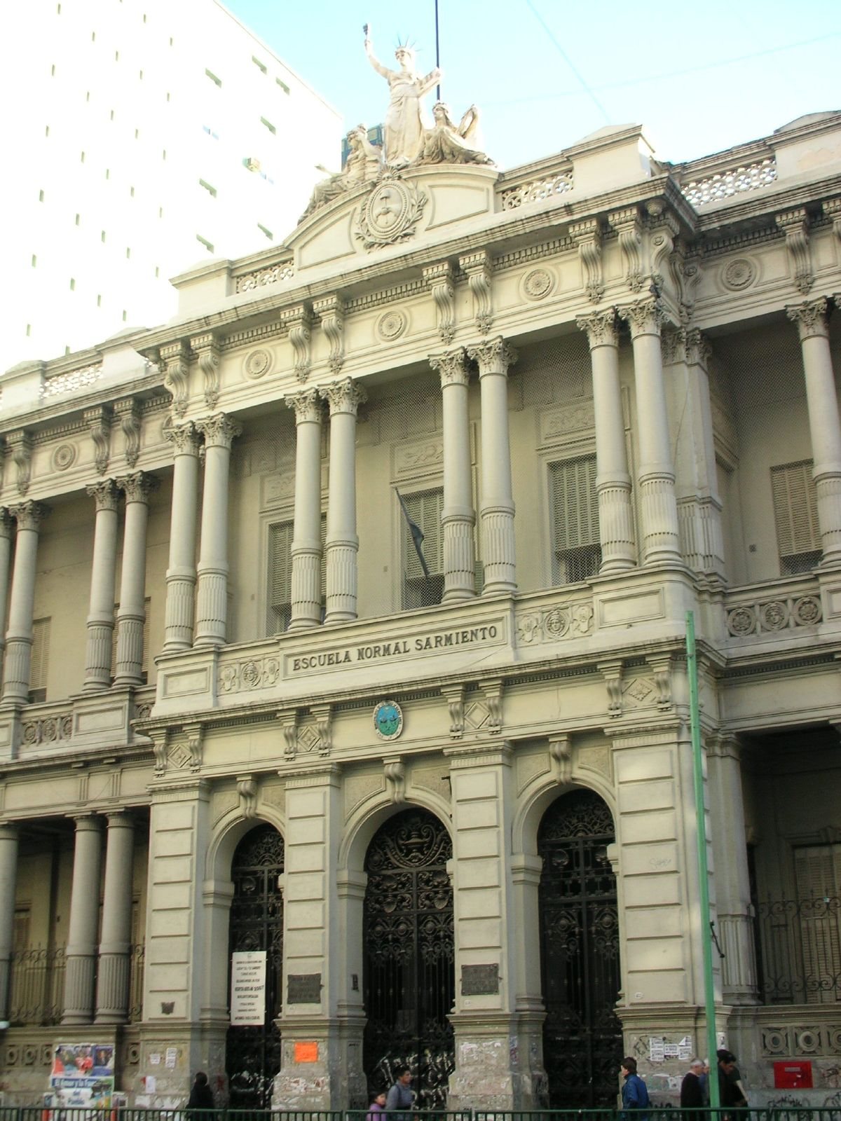 Escuela Normal Sarmiento. Callao 450, Buenos Aires, Argentina.